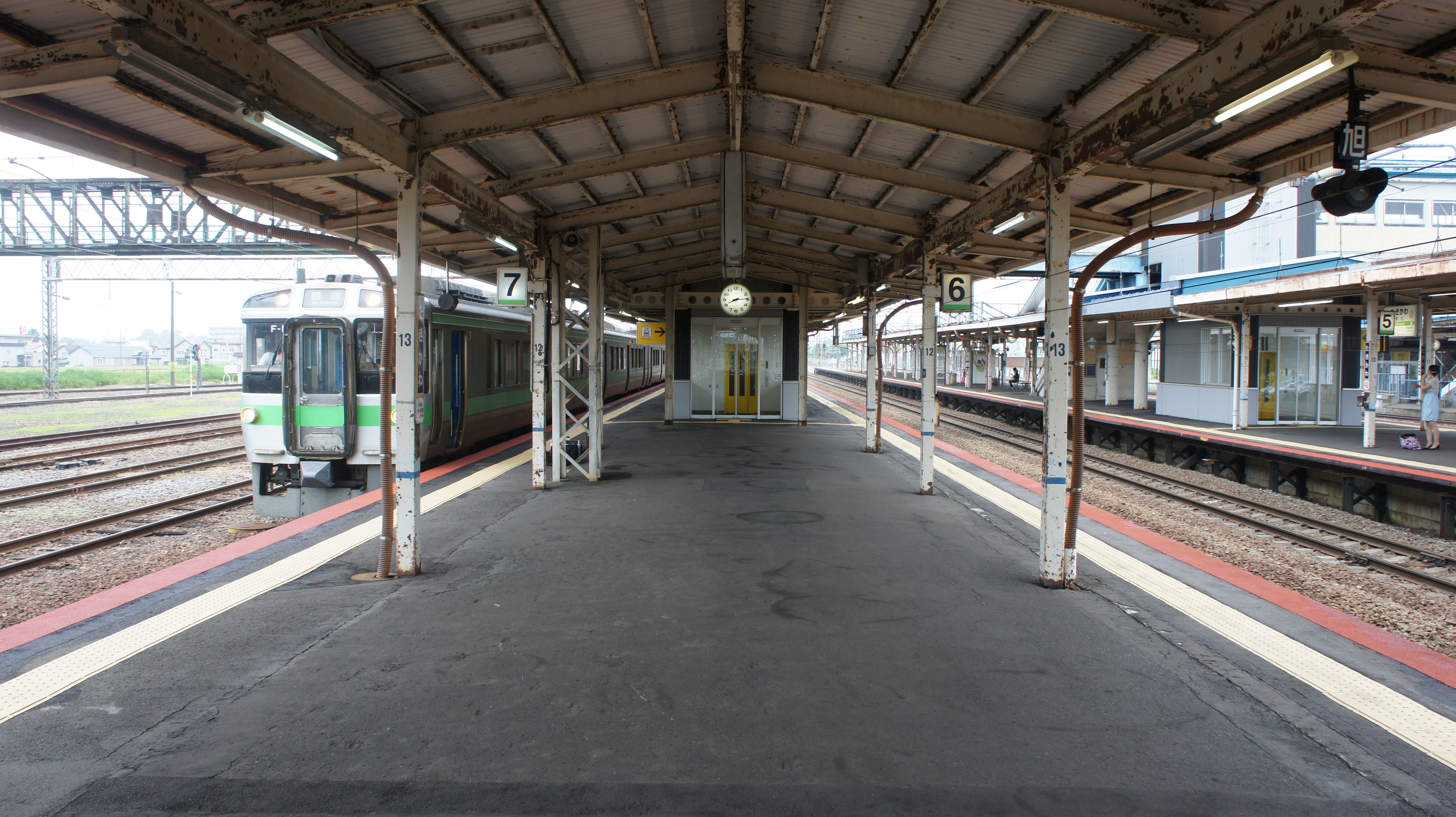 JR函館本線/根室本線・滝川駅6・7番線ホーム Sony NEX-3